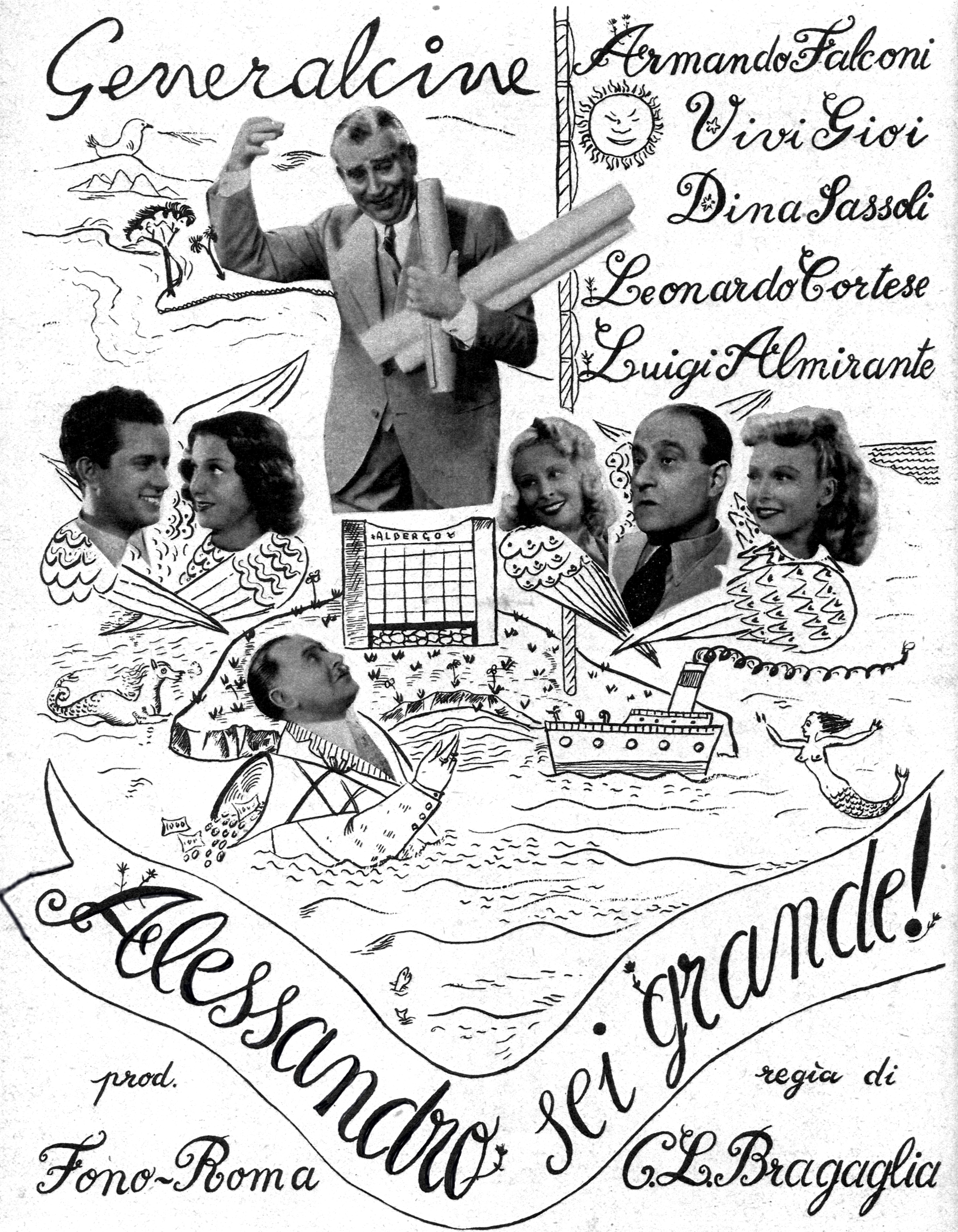 Promo del film "Alessandro sei grande!" (Bragaglia, 1940)